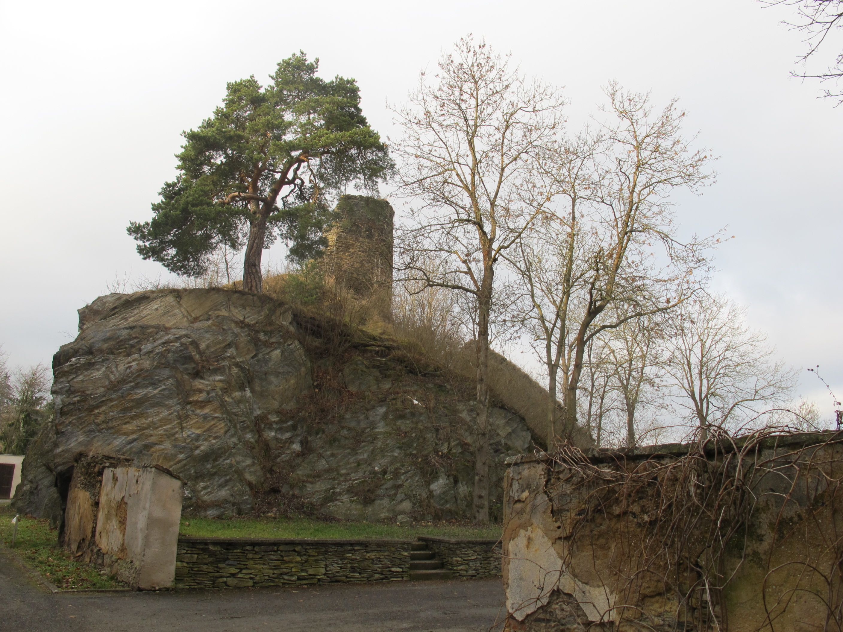 Rabštejn n. Střelou - hrad